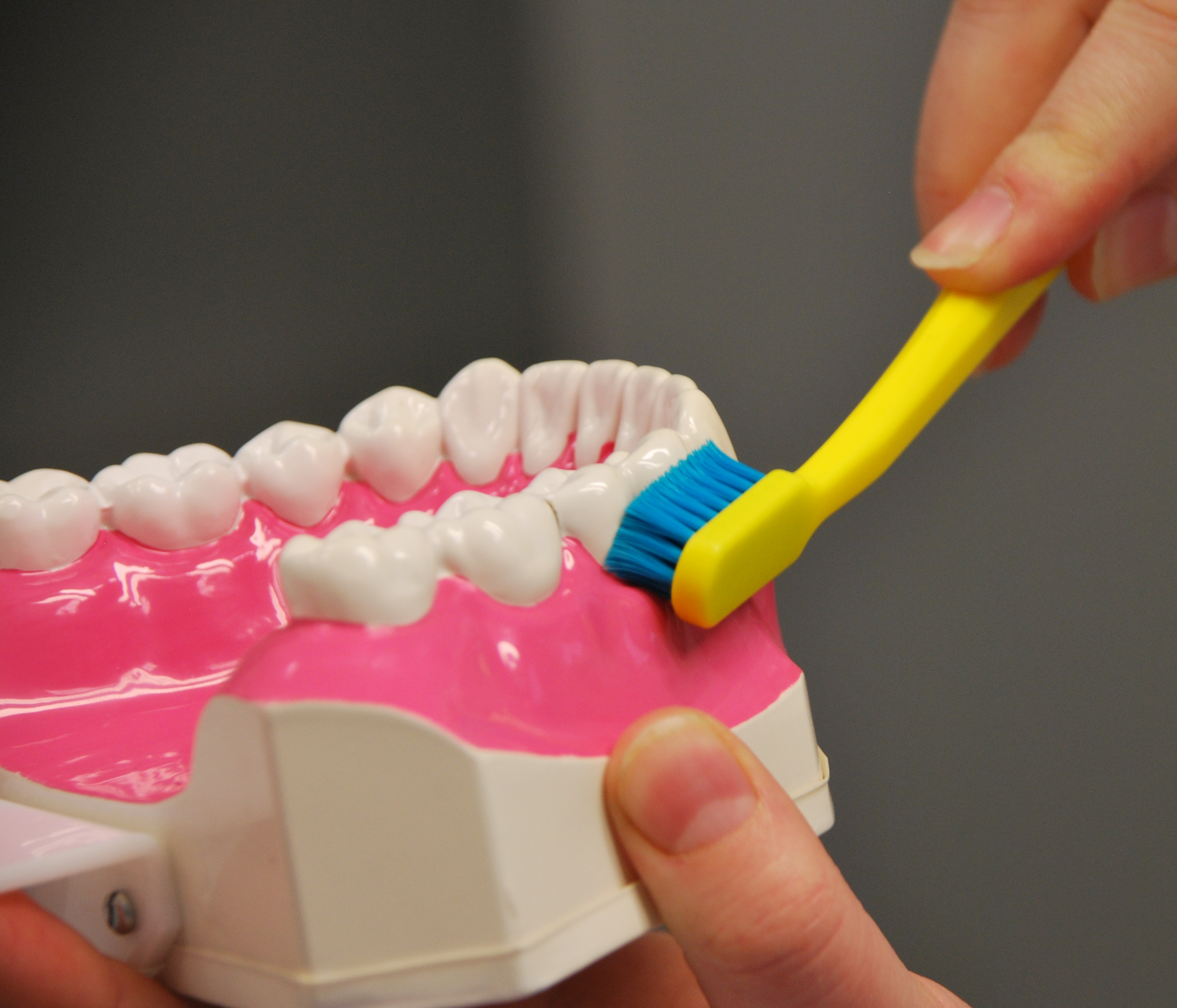 dentalni hygiena - instruktaz pacienta, cisteni zubu kartackem